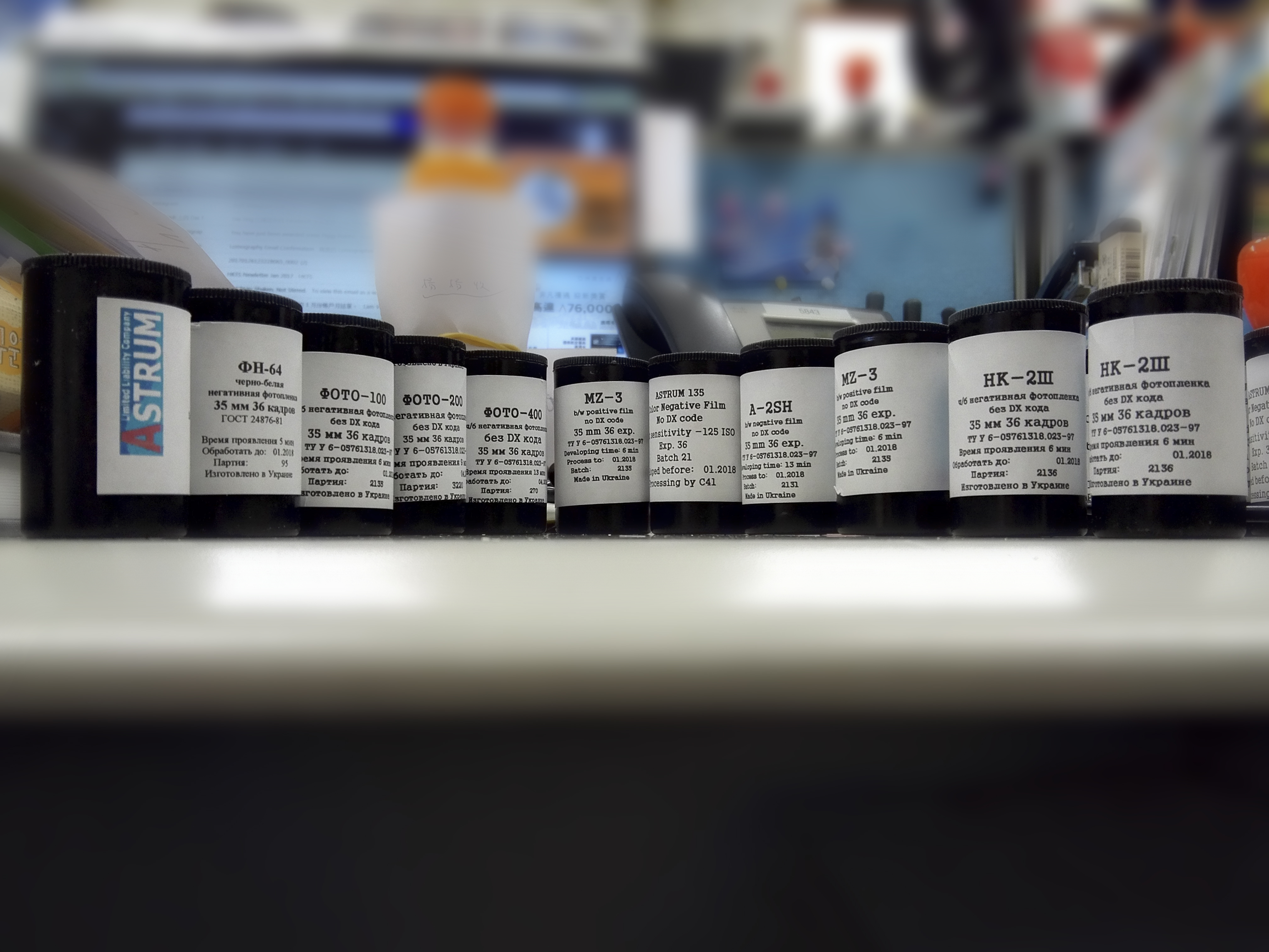 中文（香港）: Astrum生產之菲林